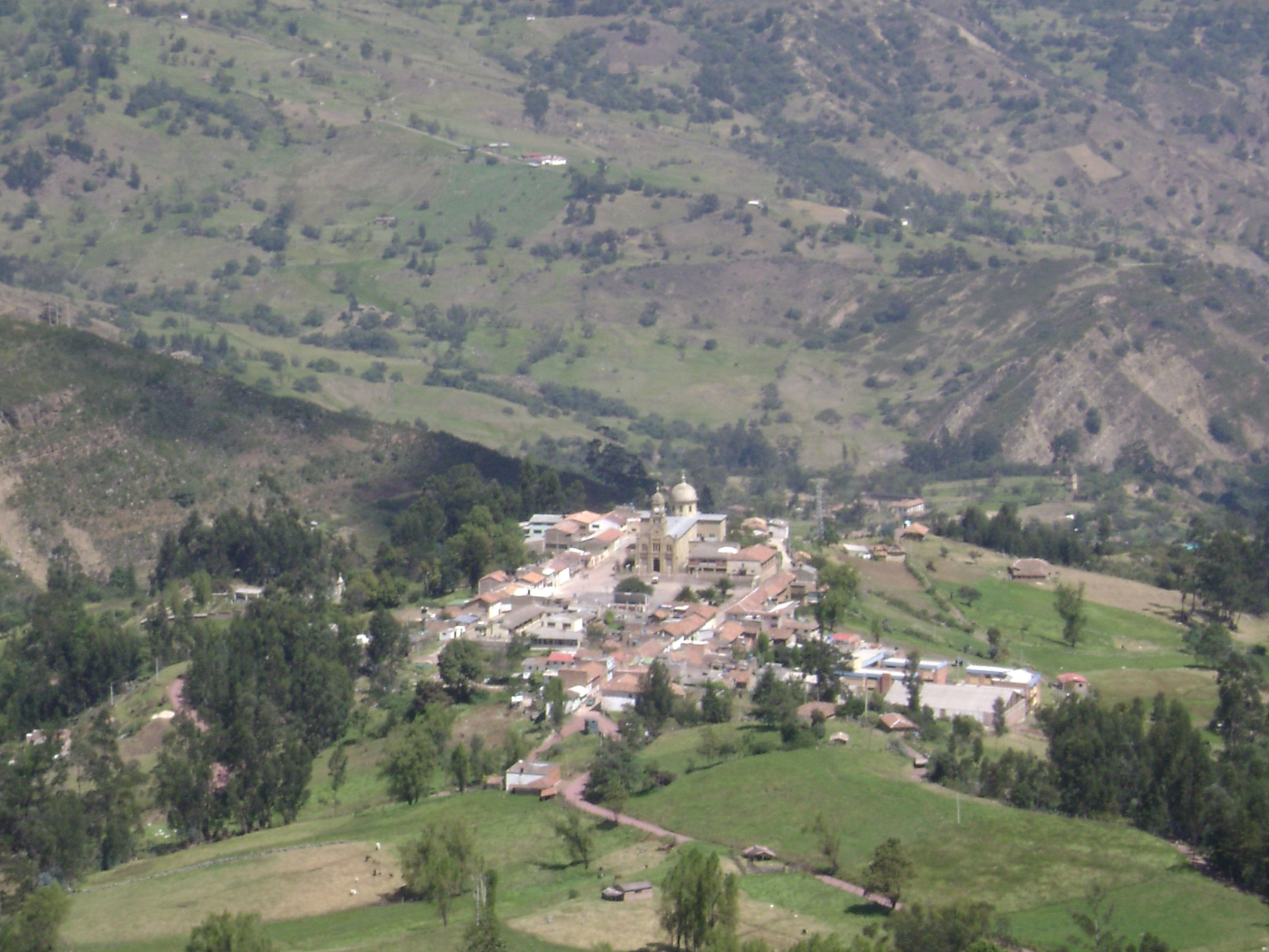 Sativasur